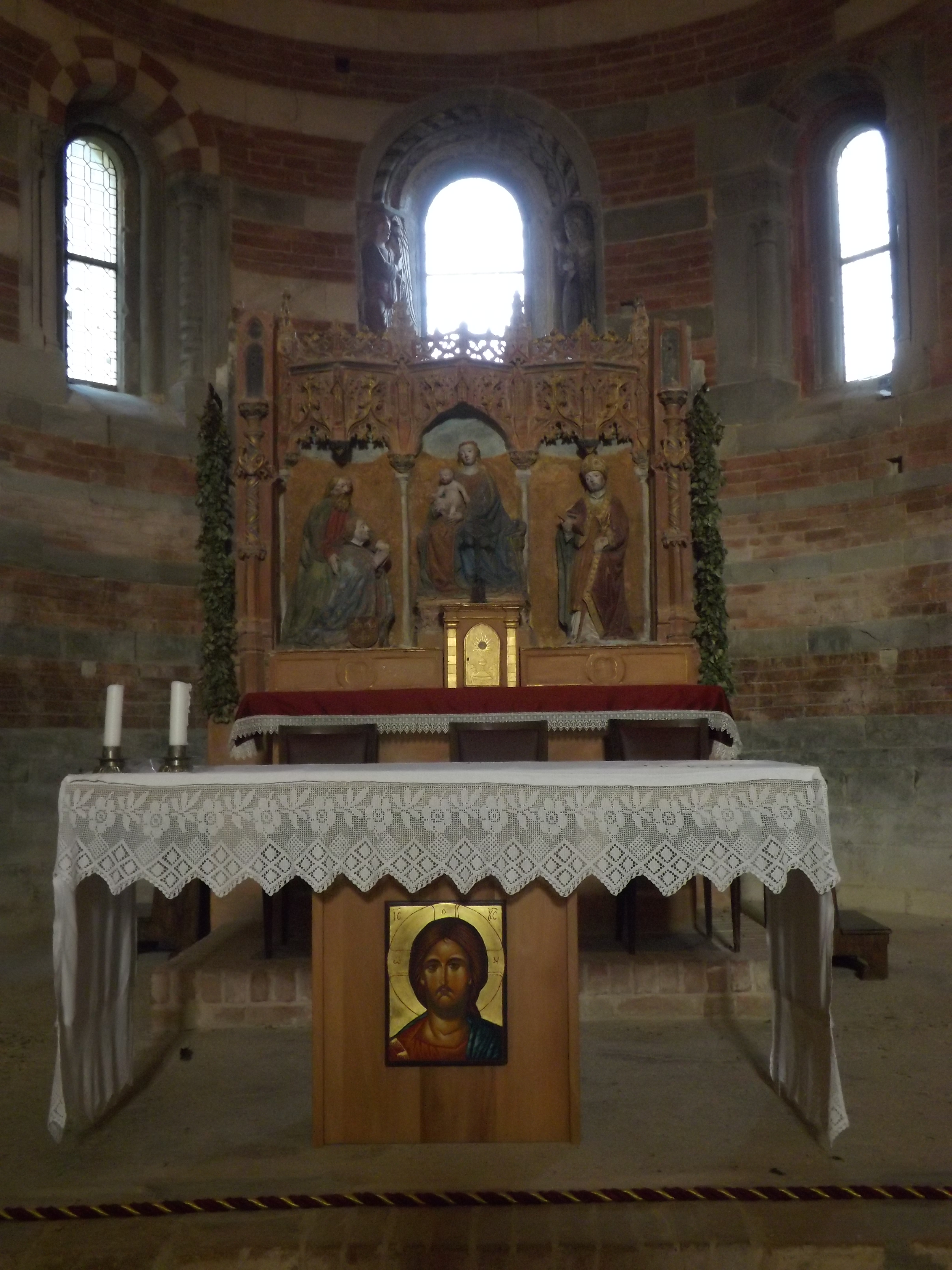 Abbazia di Santa Maria di Vezzolano This is a photo of a monument which is part of cultural heritage of Italy.